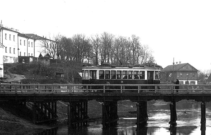 Осень 1929 года. Несуществующий ныне Новый мост через Свислочь. Трамвай идет с улицы Бакунинской (совр. Кирилла и Мефодия) по давнему маршруту конки.